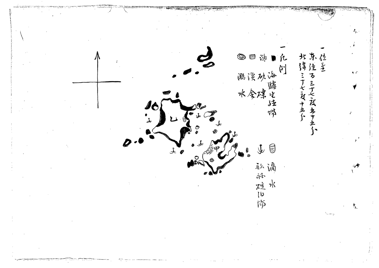 リャンコ島領土編入並ニ貸下ケ方島根県民中井善三郎ヨリ願出ノ件 4ページ目